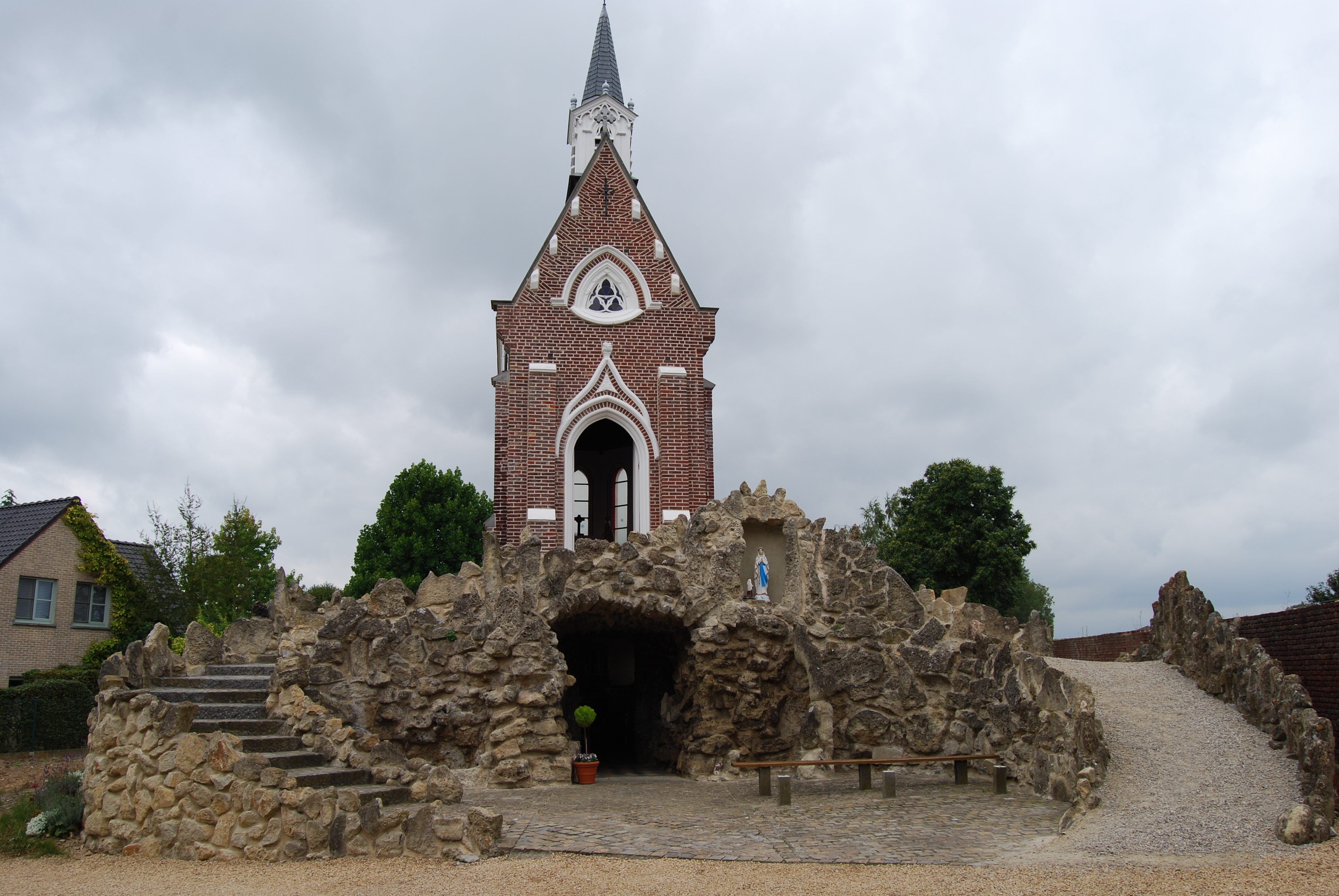 Kapel Onze-Lieve-Vrouw van Lourdes St Maria Lierde/foto genomen ter gelegenheid van fotowedstrijd Wiki Loves Monuments 2012.